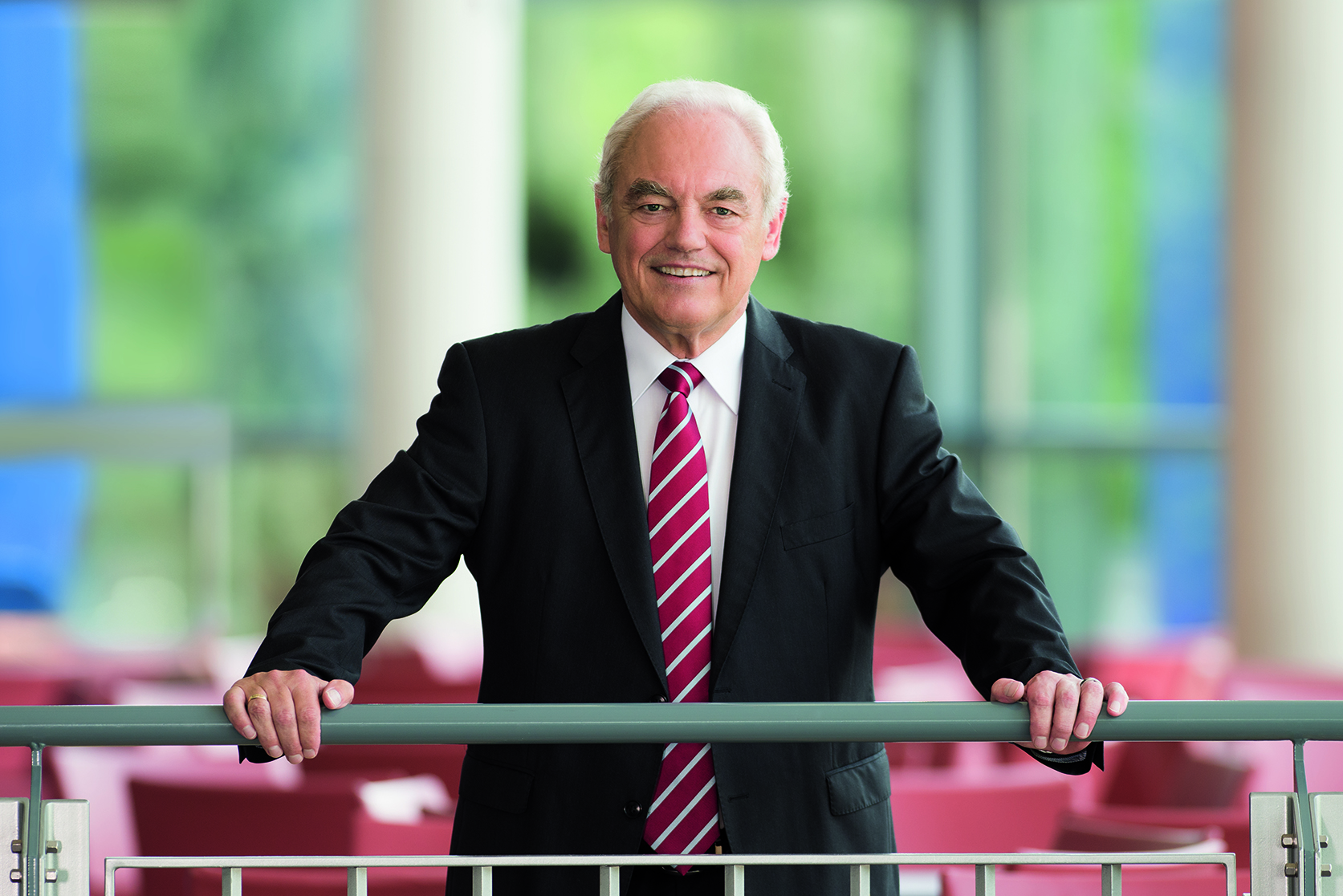 Porträt von Walter Schneeloch, Präsident des Landessportbundes Nordrhein-Westfalen e. V.